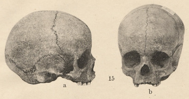 Schädel aus der merowingerzeitlichen Nachbestattung aus dem Fürstengrab von Helmsdorf